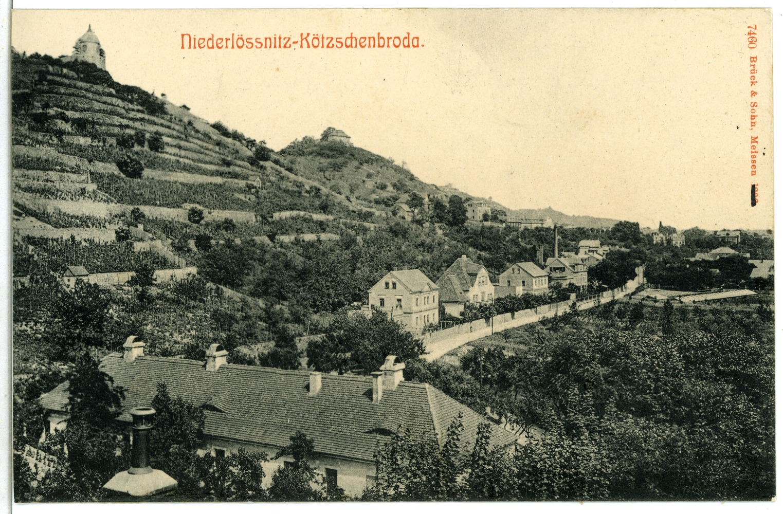 Kötzschenbroda; Niederlößnitz mit Jacobstein This postcard is from publisher Brück & Sohn in Meißen ( postcard has a unique number 07460 and is available in a higher resolution at the publisher. This images was uploaded in a cooperation project between Wikipedians and the publisher.